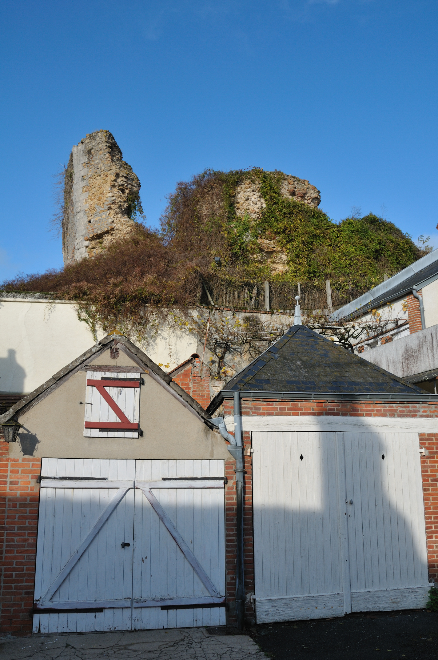 Ruines du donjon de la Motte, Saint-Gondon, Loiret, France